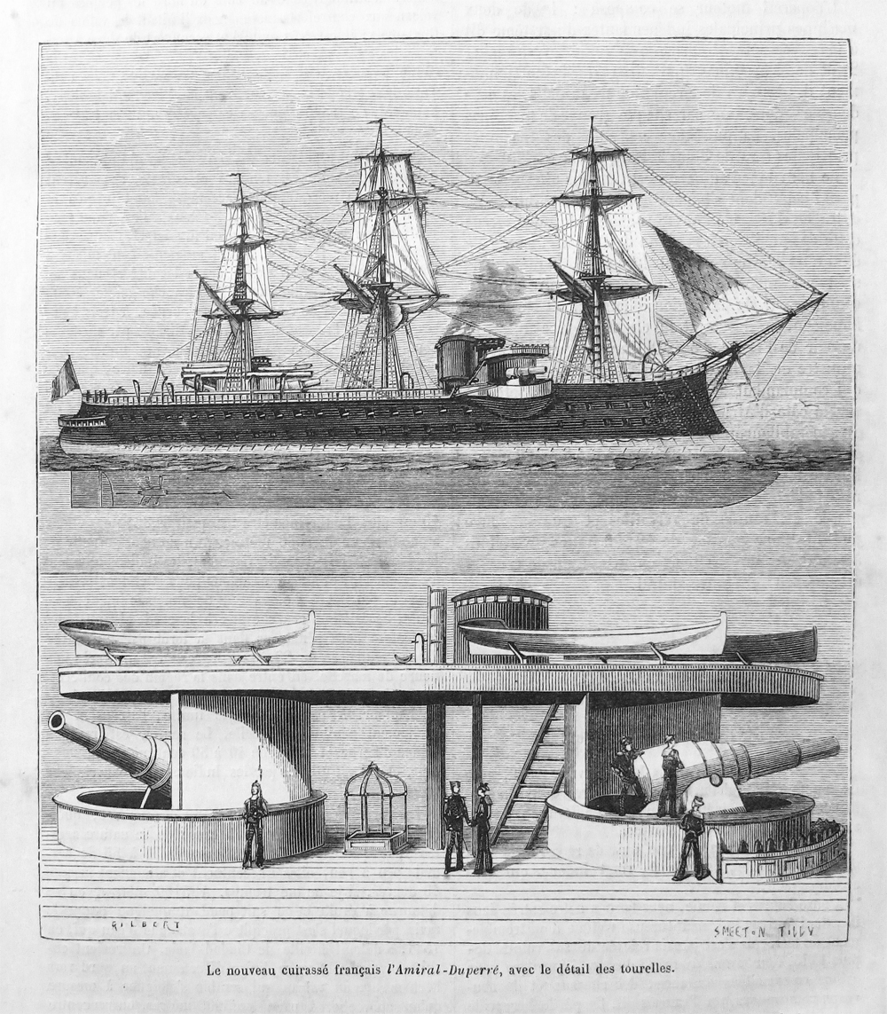 Gravure du cuirassé français "Amiral-Duperré" réalisée au moment de sa construction et détail de son artillerie.